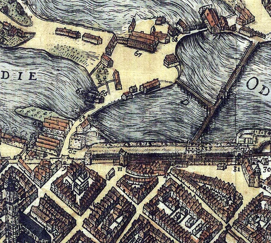 północne okolice Wrocławia wzdłuż Odry Obiekty oznaczone na mapie liczbami: w lewym dolnym narożniku mapy 10 kościół św. Elżbiety (Elisabethkirche) 12 ul. Odrzańska (Odergasse) wzdłuż muru, od lewej 9 Furta Młyńska (Mühl pfort) 11 Brama Odrzańska (Oder thor) 34 Furta Rybacka {Fischer pfort) 33 Brama Nowa (New thor) 31 Brama Cesarska (Kaysers thor) 30 zamek cesarski (Kayserlicher burg) na północ od muru 62 wieża wodna (Wasserhaus) 63 młyn Średni (Mittelmühle) 64 młyn Słodowy (Maltzmühle) 65 szlifiernia (Schleiffmühle) 66 tartak (Brettmühle) 67 młyn Tylni (Hintermühle) 68 młyn Papierniczy (Papyrmühle) 71 folusz (Walckmühle)